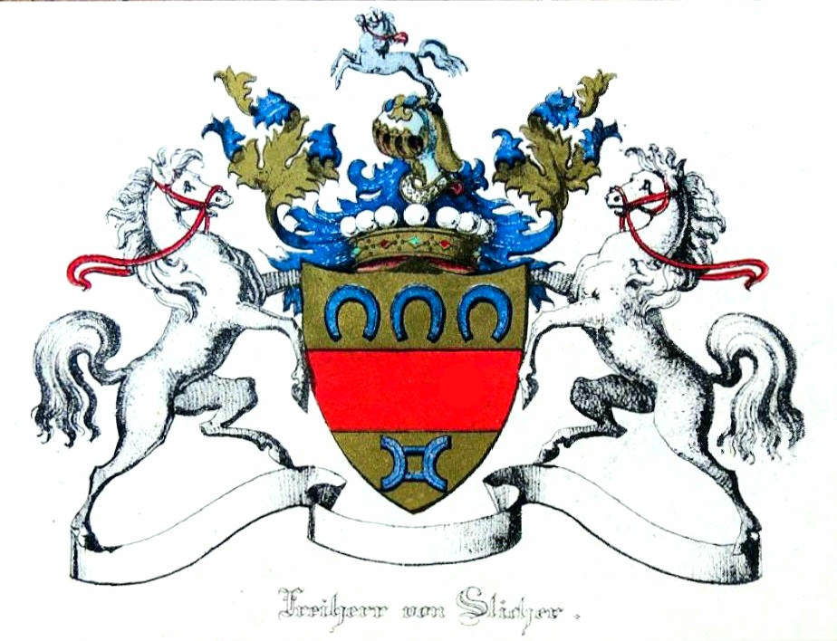 Wappen derer Freiherren von Slicher.